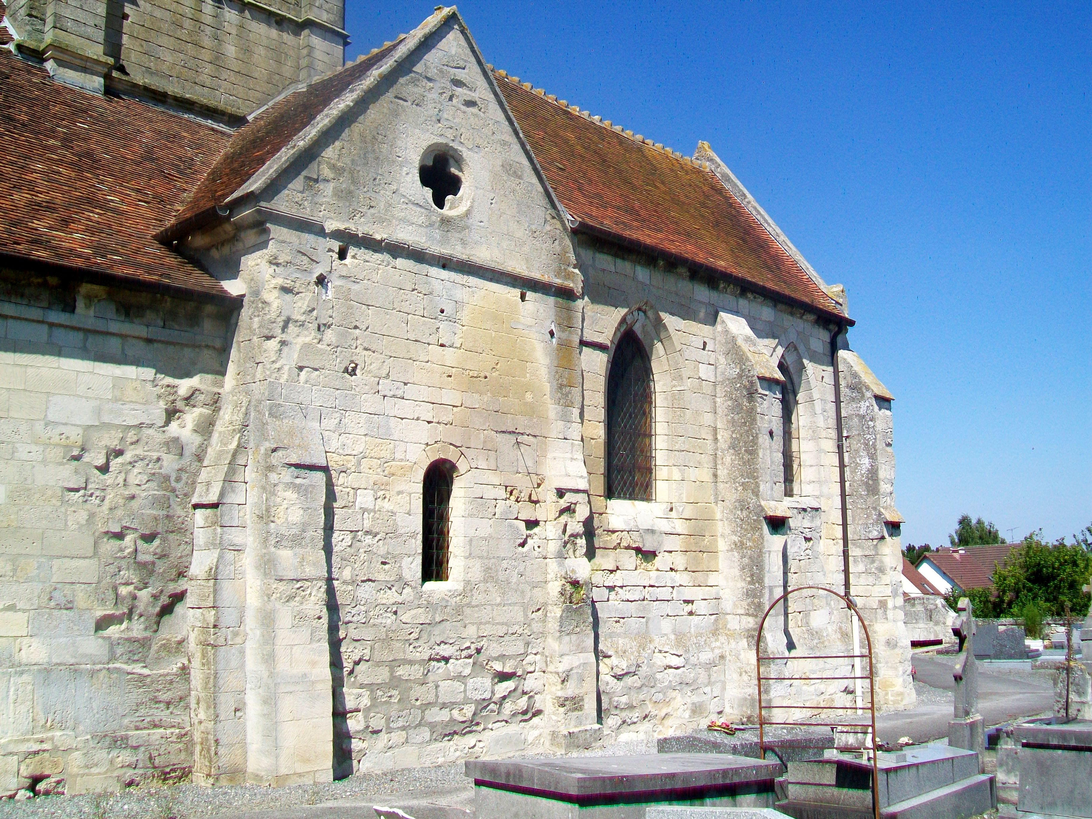 Croisillon sud et élévation sud de la chapelle latérale sud du chœur.